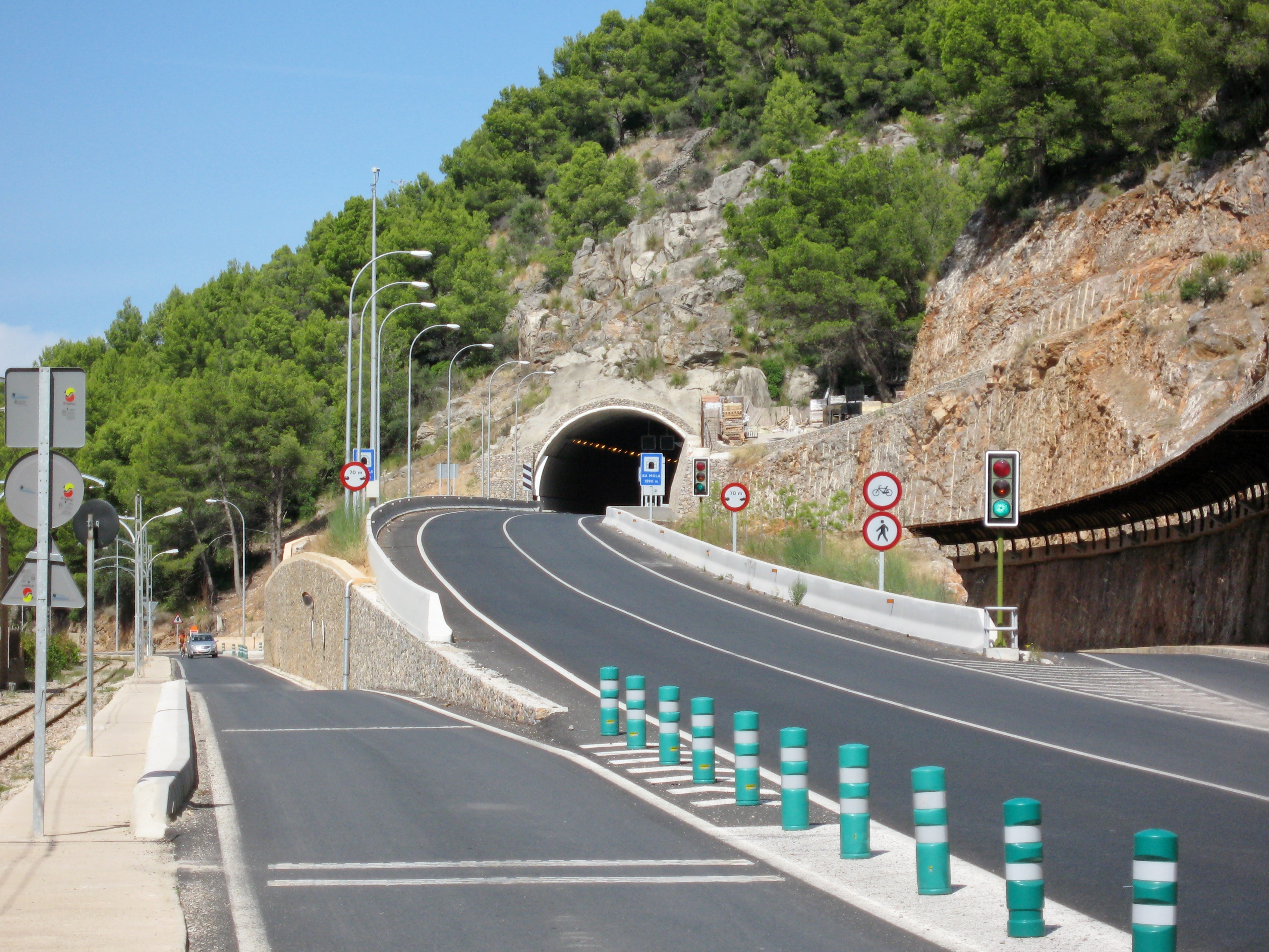 Tunneleinfahrt in den Túnel de sa Mola nach Port de Sóller, Gemeinde Sóller, Mallorca, Spanien